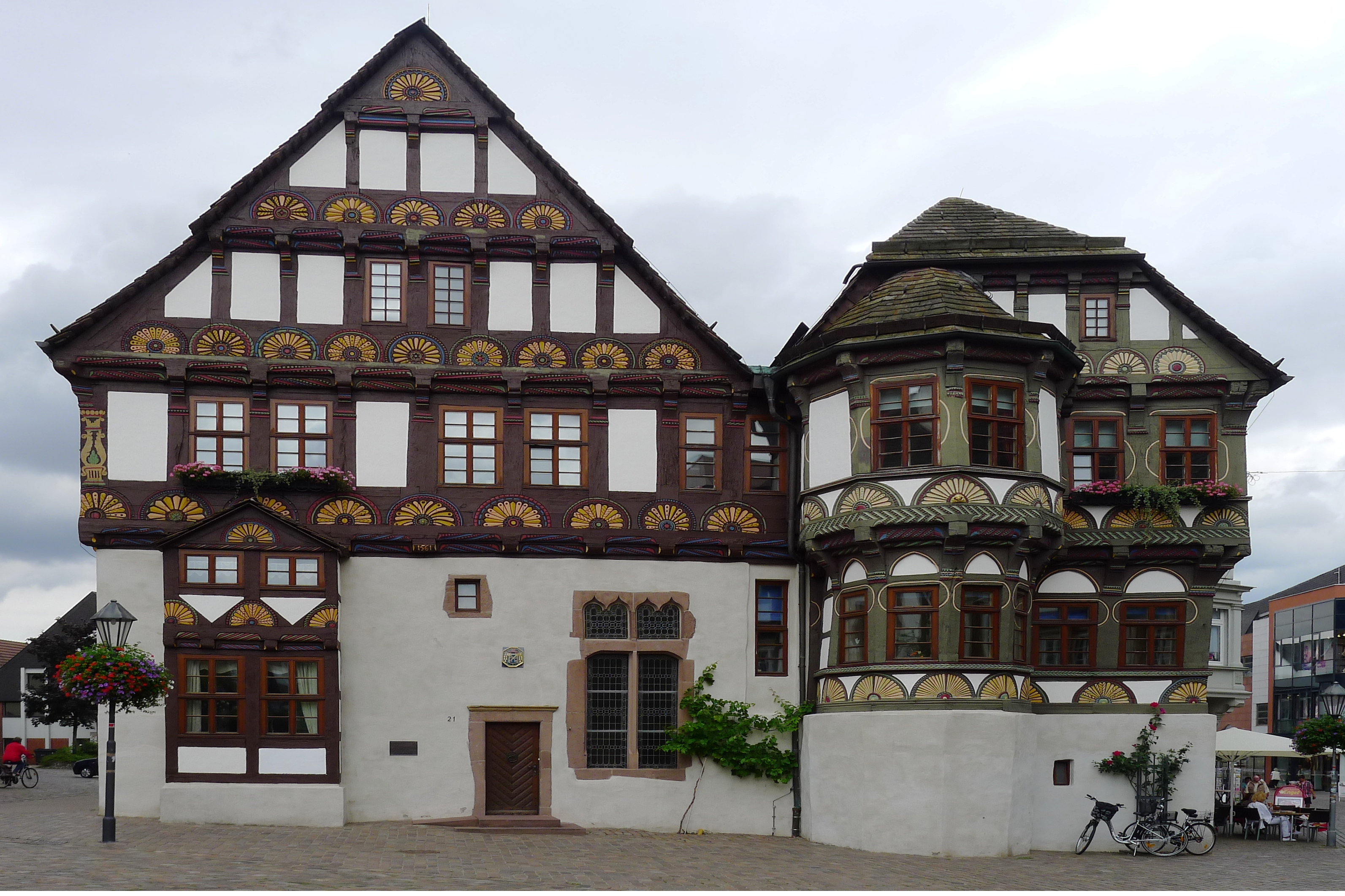 Dechanei, verziert mit Fächerrosetten, erbaut 1564-1571